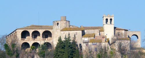 Castillo de Medinya